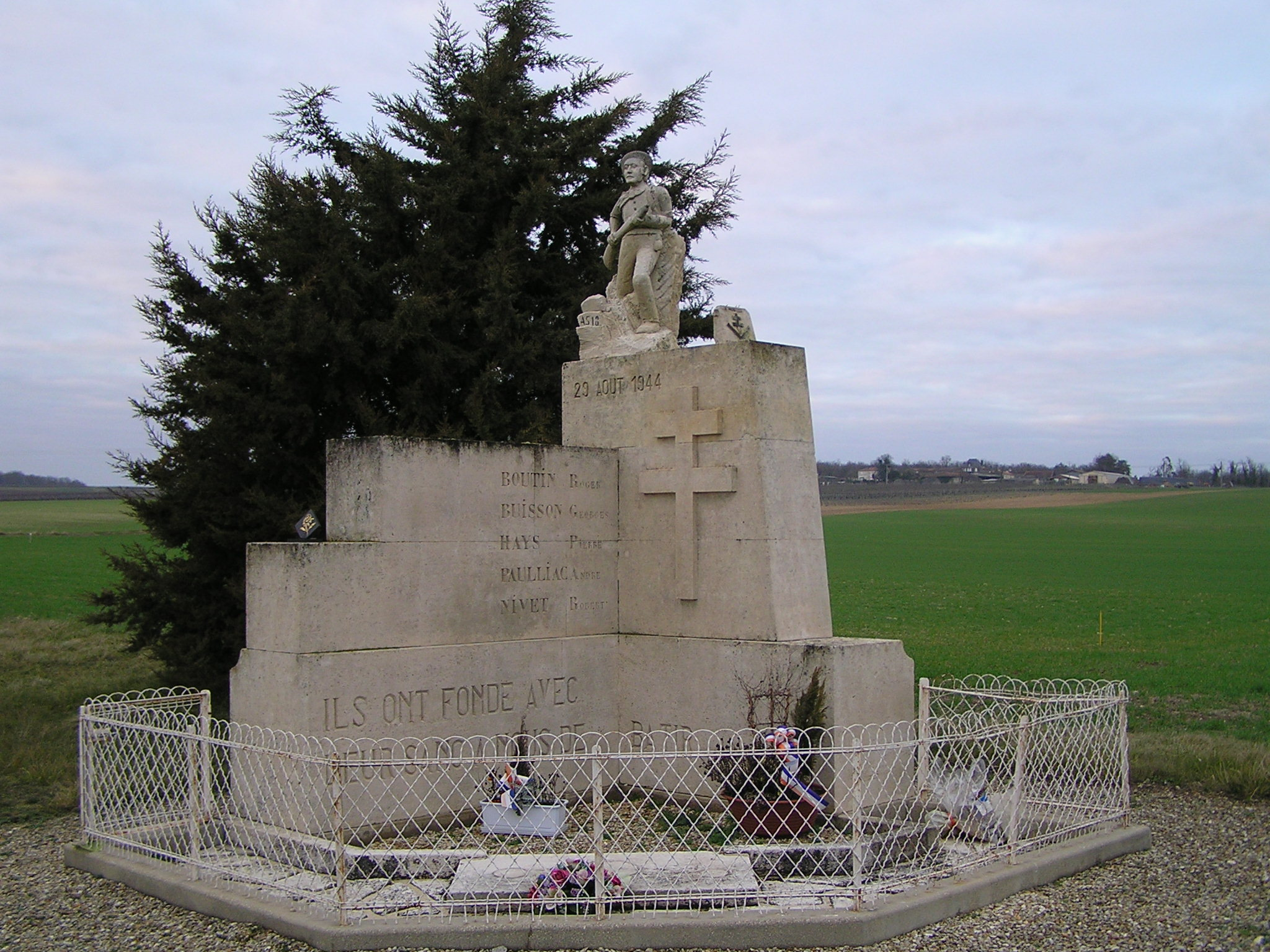 monument aux morts de Douvesse 1944, Bouteville